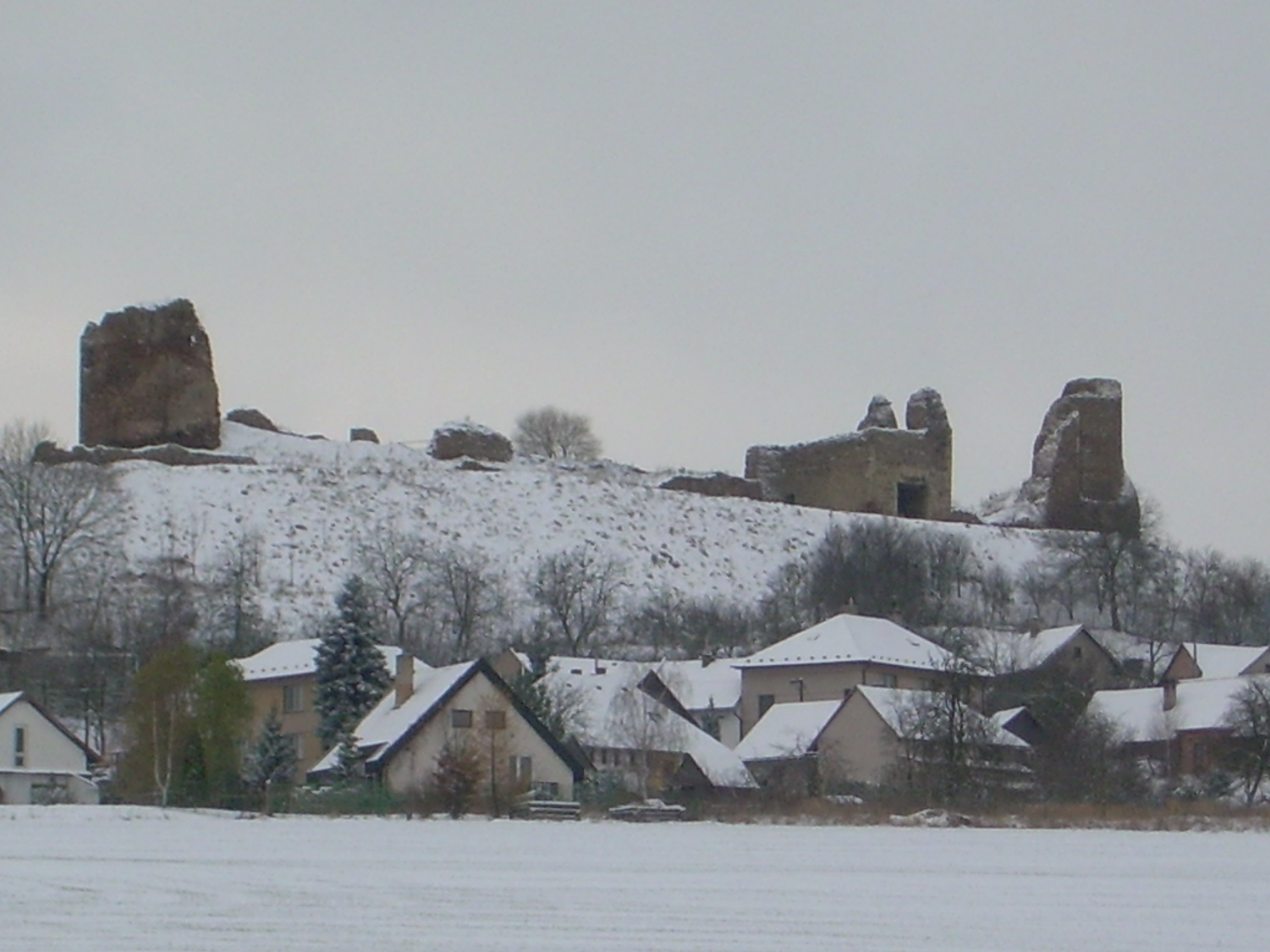 Zřícenina hradu Lichnice